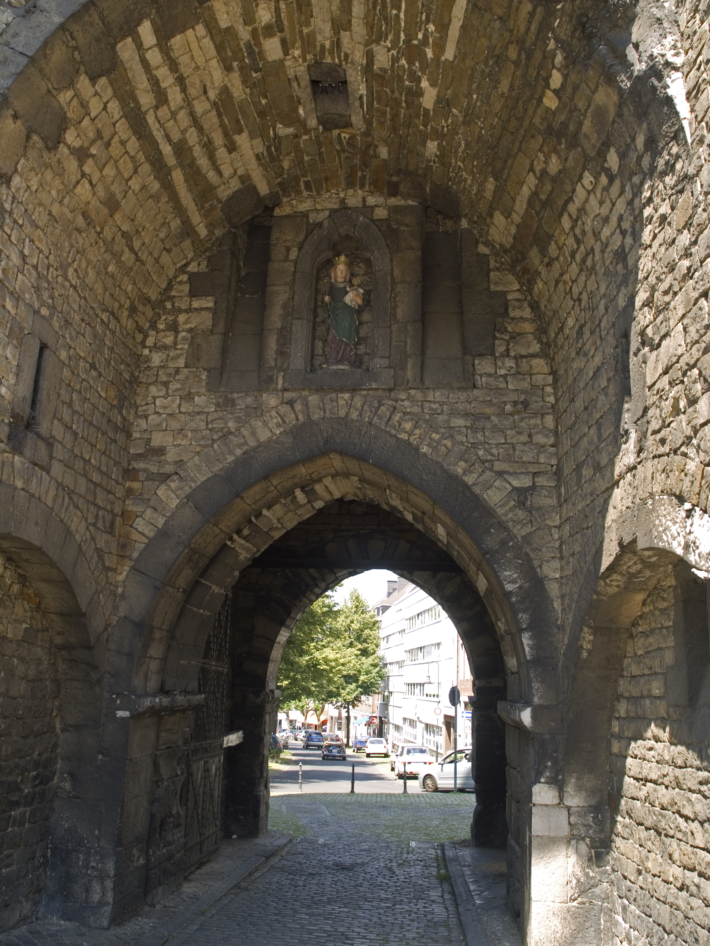 Германия, Северный Рейн-Вестфалия, Ахен. Городские ворота Marschiertor